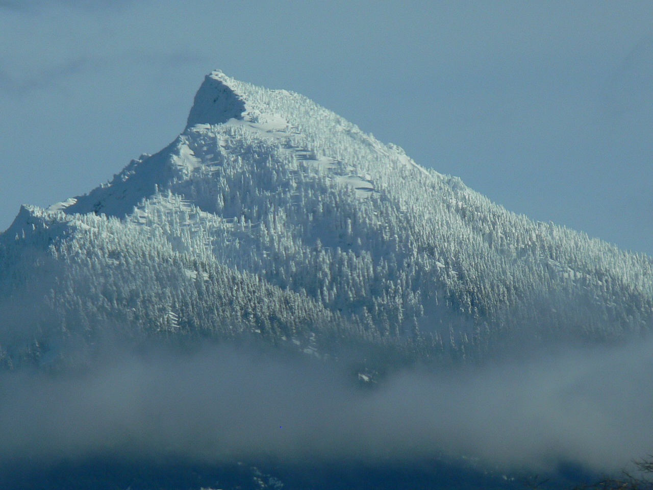 Mount Pilchuck in winter, taken from Granite Falls.